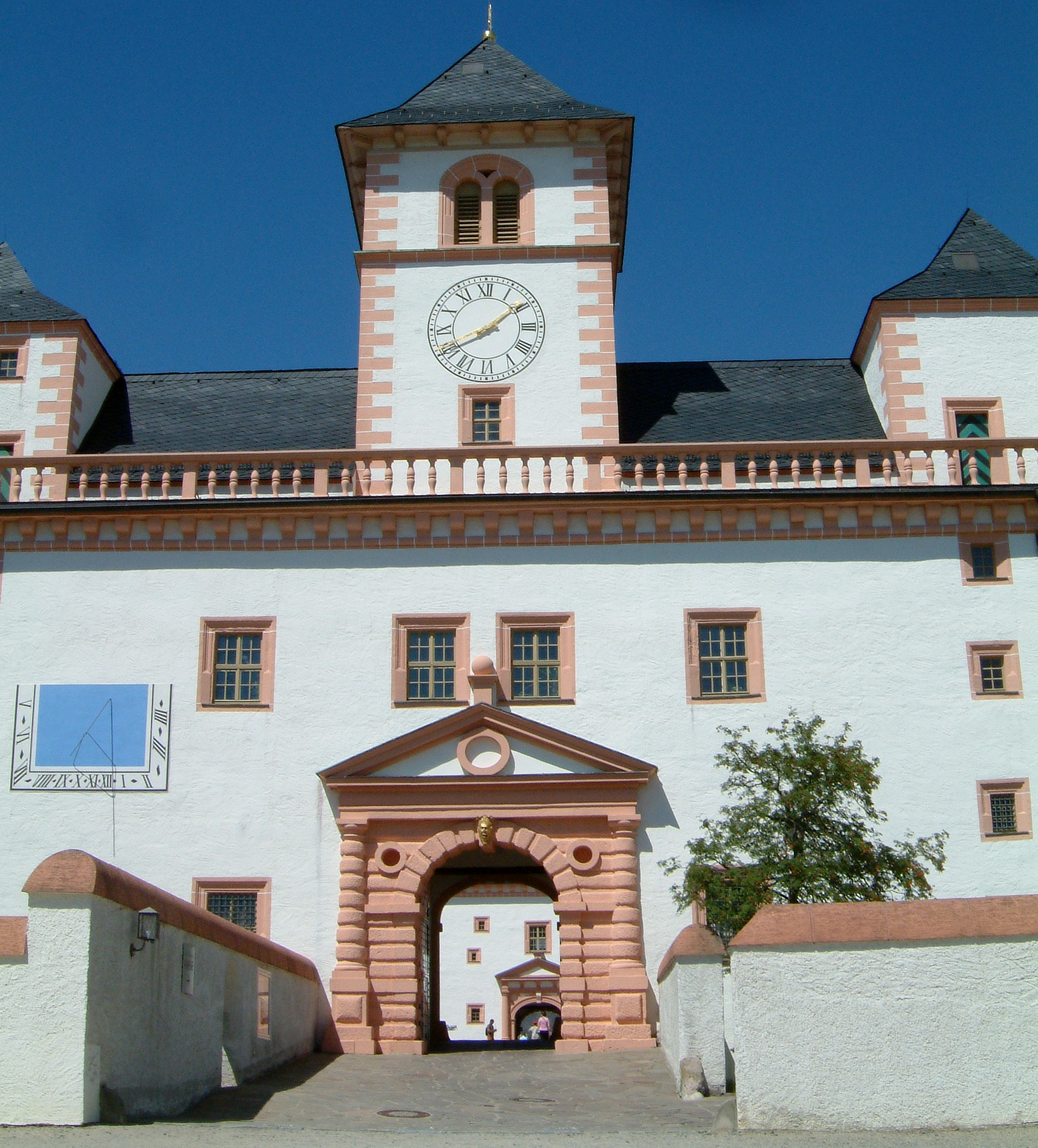 Schloss Augustusburg Südtor von außen 6 Aug 2007